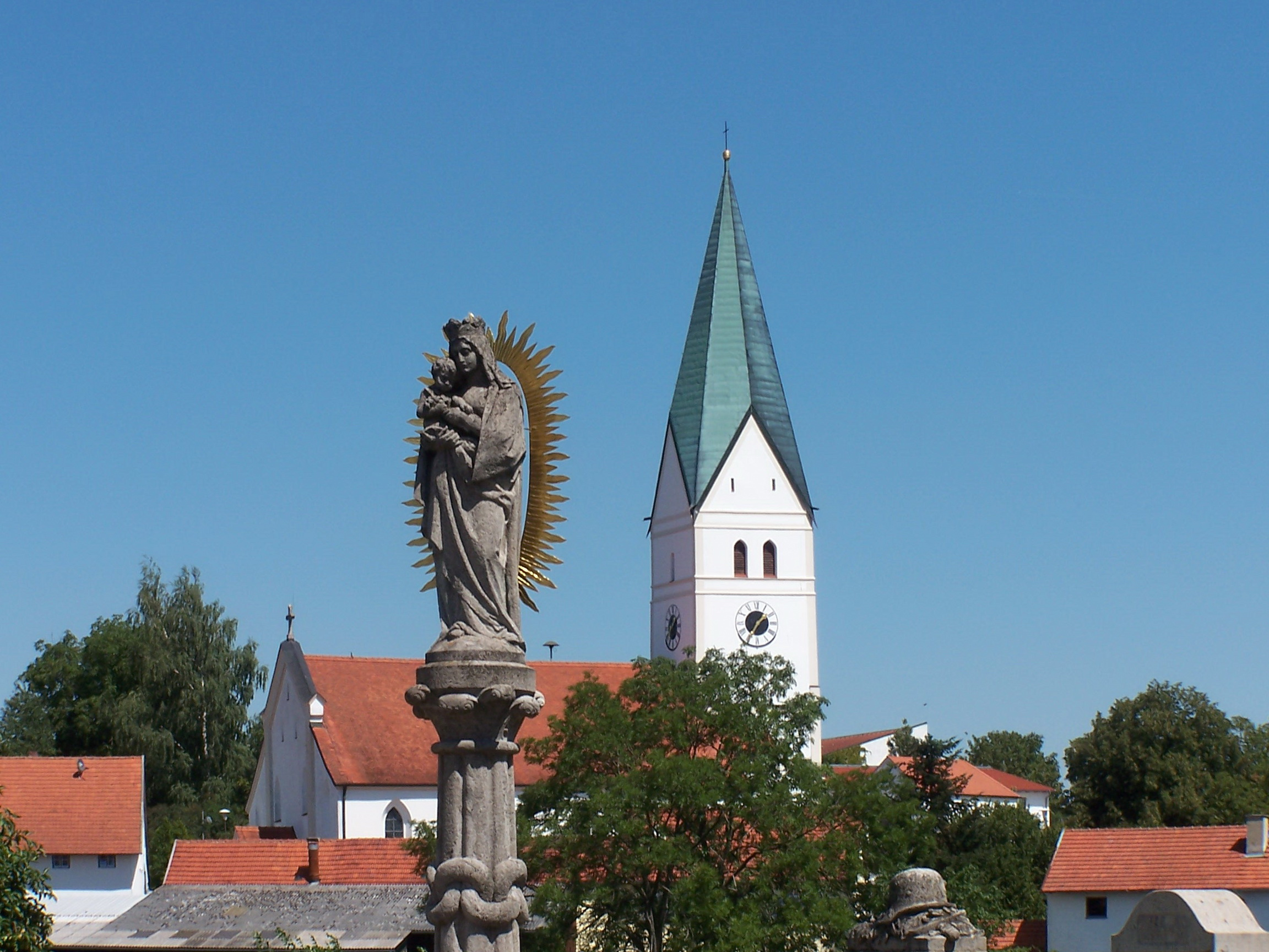 Obersüßbach. Mariensäule aus der 2. Hälfte 19. Jahrhundert; beim Kriegerdenkmal.